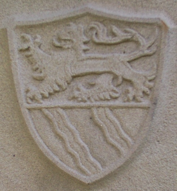 Landkreiswappen des ehemaligen Landkreises Schwerin (Warthe)